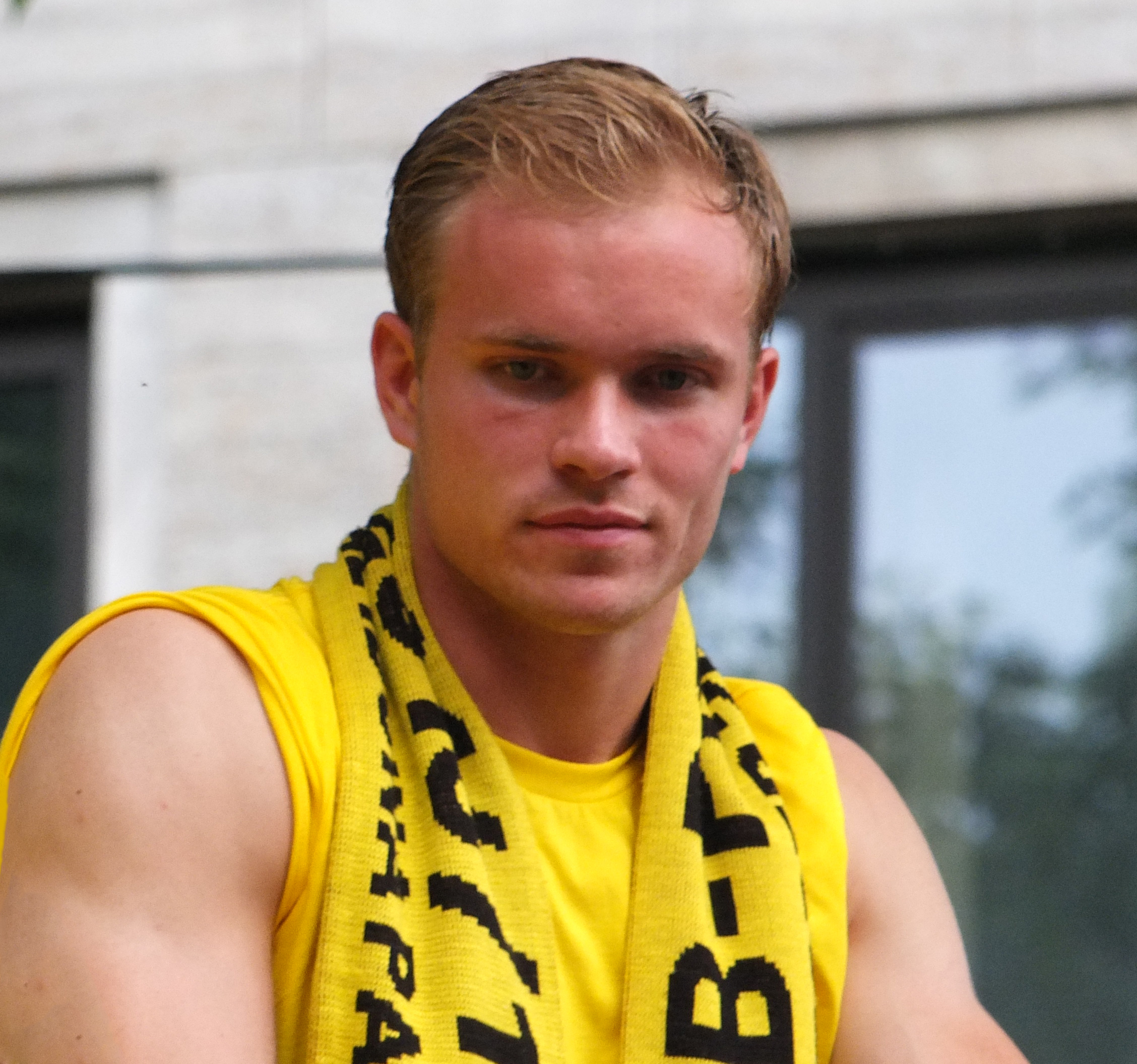 Hendrik Bonmann bei der DFB-Pokal-Feier.